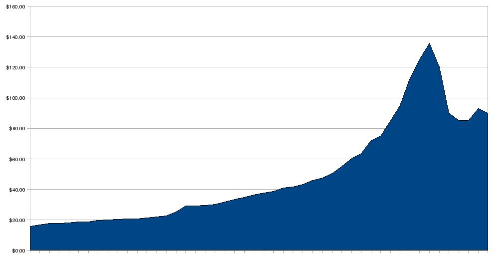 Цени на урана в периода 2004-2007 г.